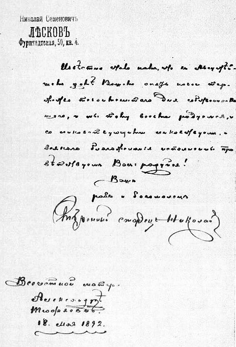 Письмо Н. С. Лескова А. Н. Пешковой-Толиверовой от 18 мая 1892 года с поздравлением с днём именин